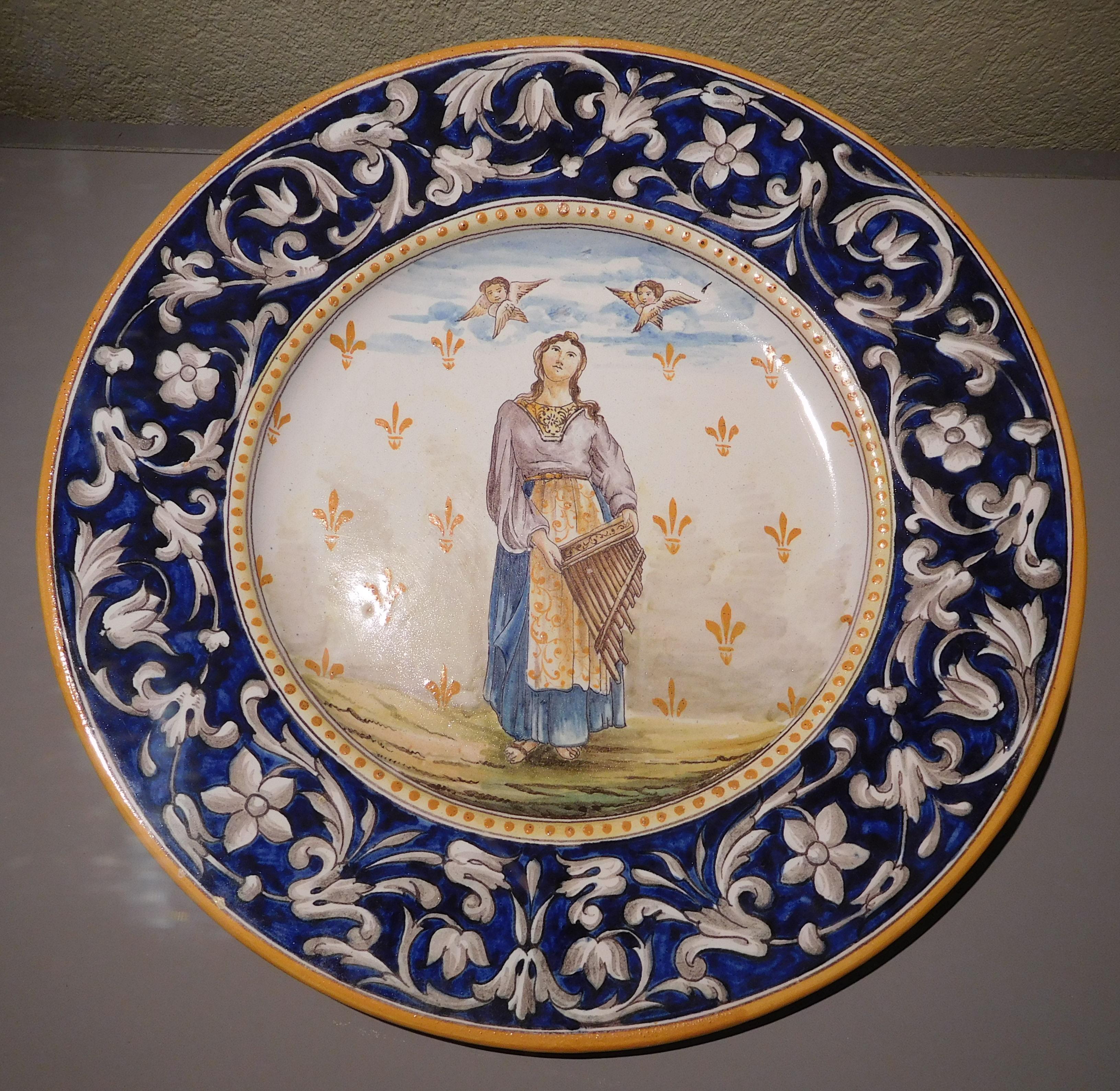 Texte de la fiche du musée : Manufacture du bout du monde, Sainte Cécile 1888 Faïence de Nevers à décor grand feu Musée de la faïence, Nevers, inv. NF 2000.1.1 Référence : Joconde database: entry 01550009956 Diamètre : 36 cm Photographie prise lors des Journées européennes du patrimoine 2015, dans le cadre de l'exposition « En avant la musique ! Les arts et la musique », au musée de la Loire (Cosne-Cours-sur-Loire, Nièvre, France).